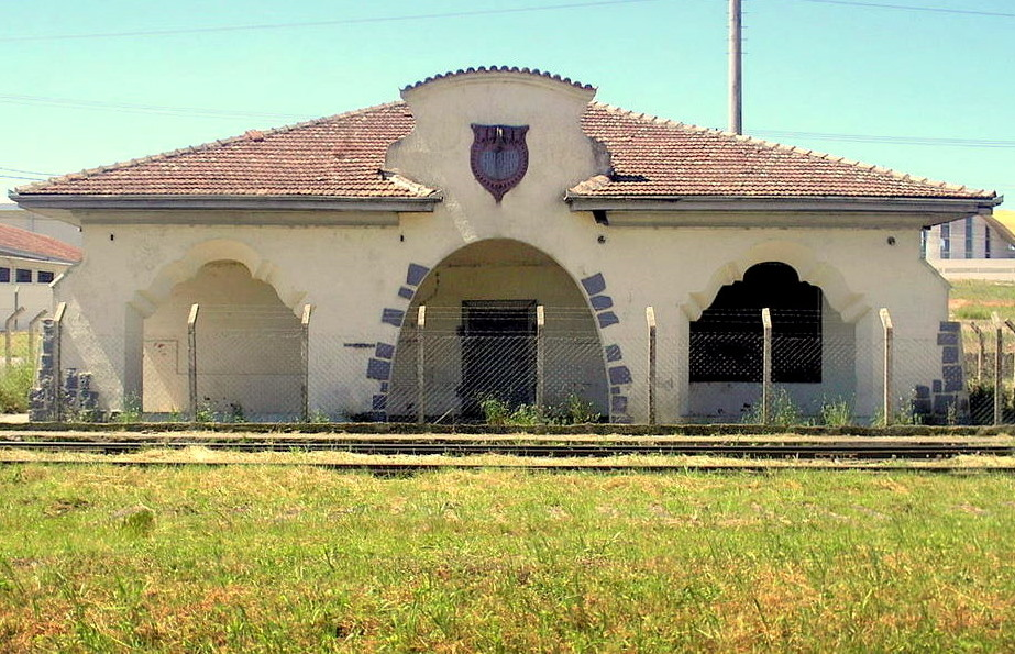 Estação Ferroviária do Município de Pinhais (Grande Curitiba), PR, Sul do Brasil. Construção da década de 1940, hoje abandonada pela ALL.